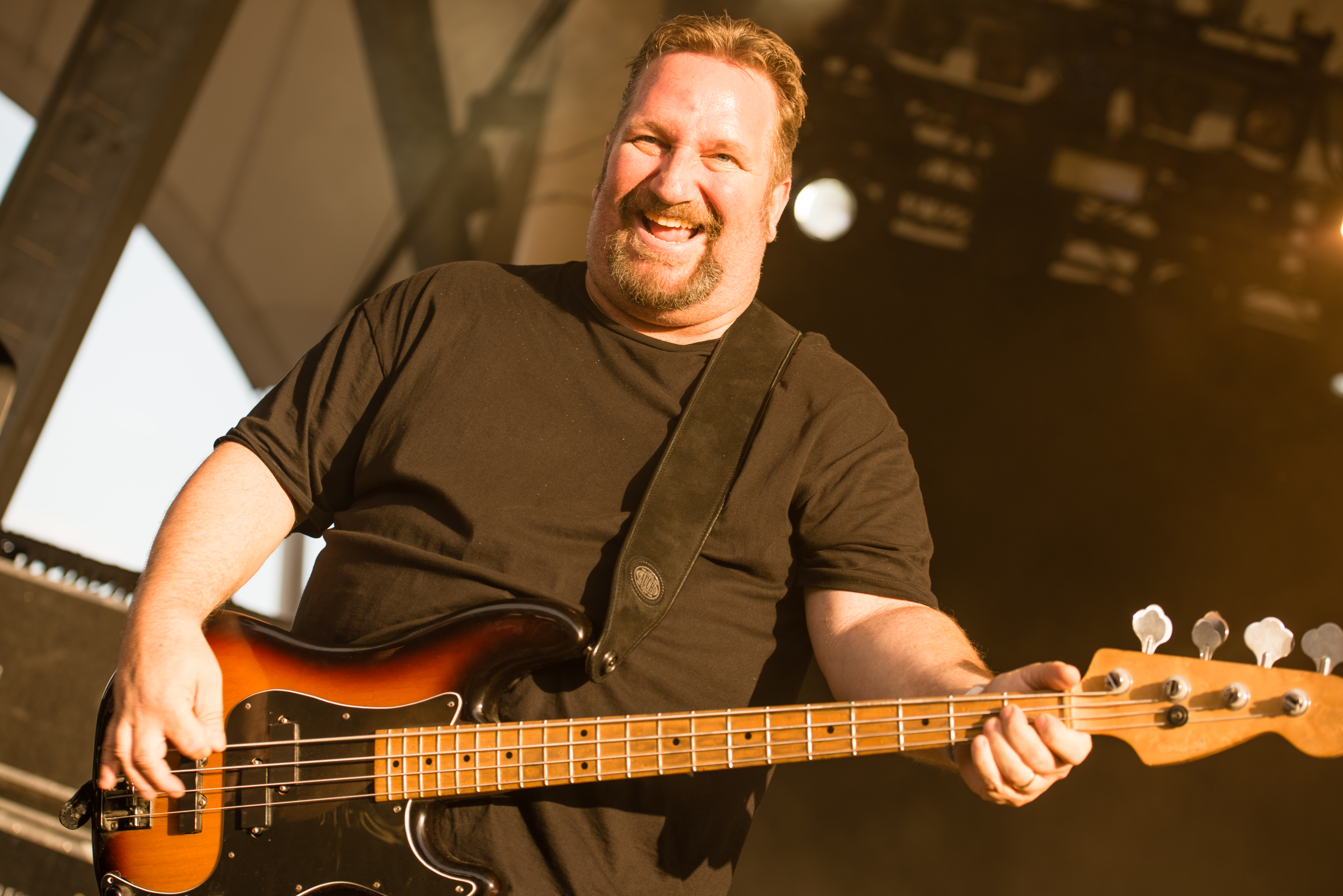 'Rock Hard Festival 2014 - Gelsenkirchen': 'Sacred Reich'